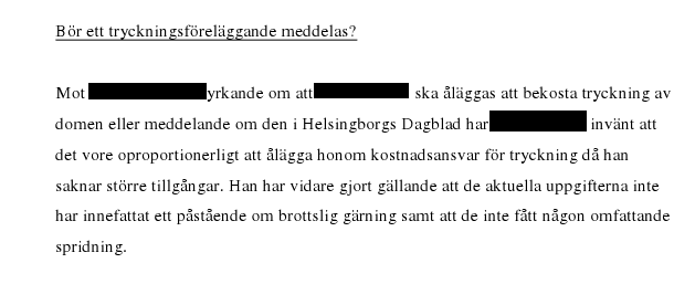 A part of a verdict